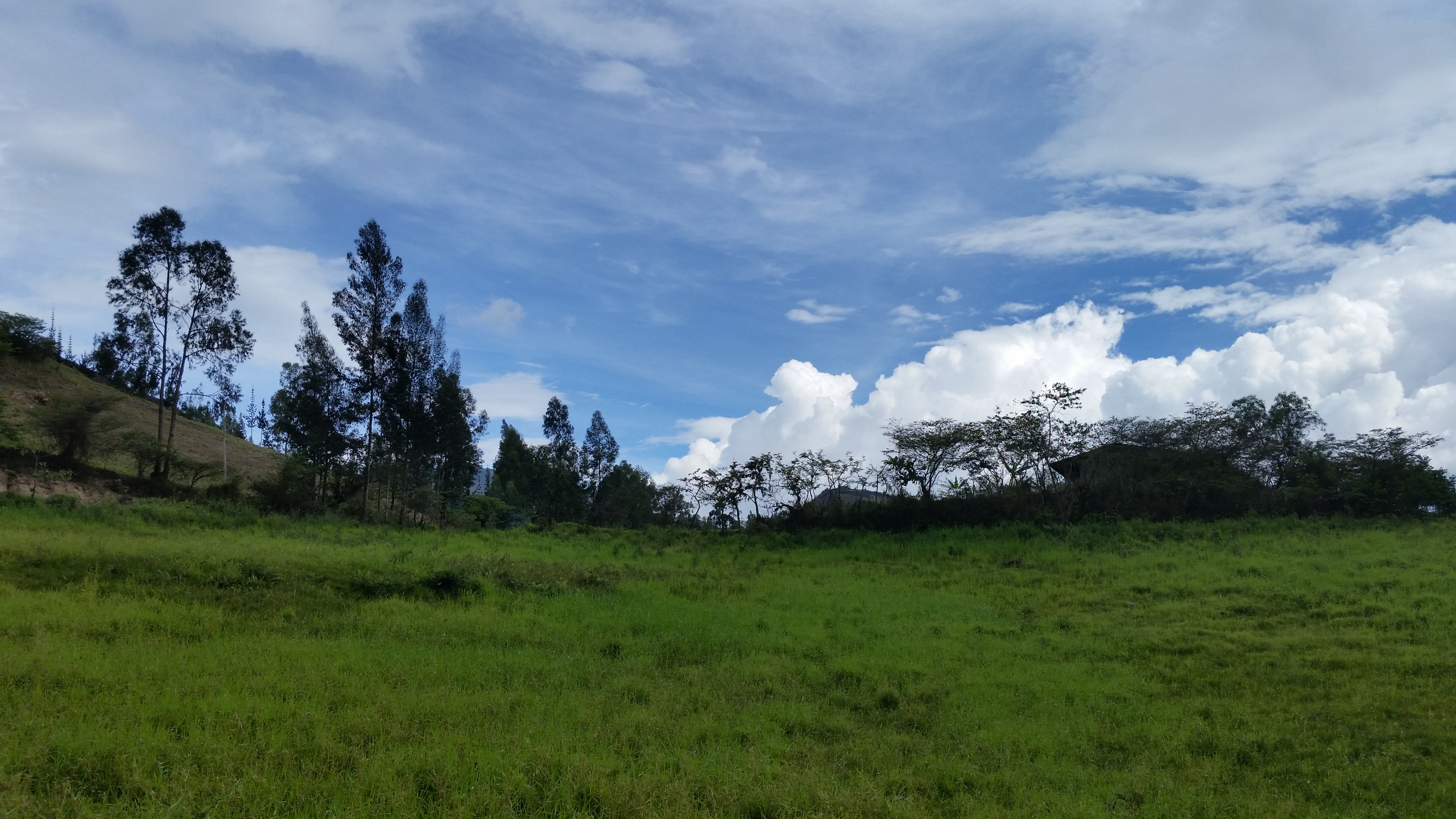 Paramos - Valle Quebrada El Vino